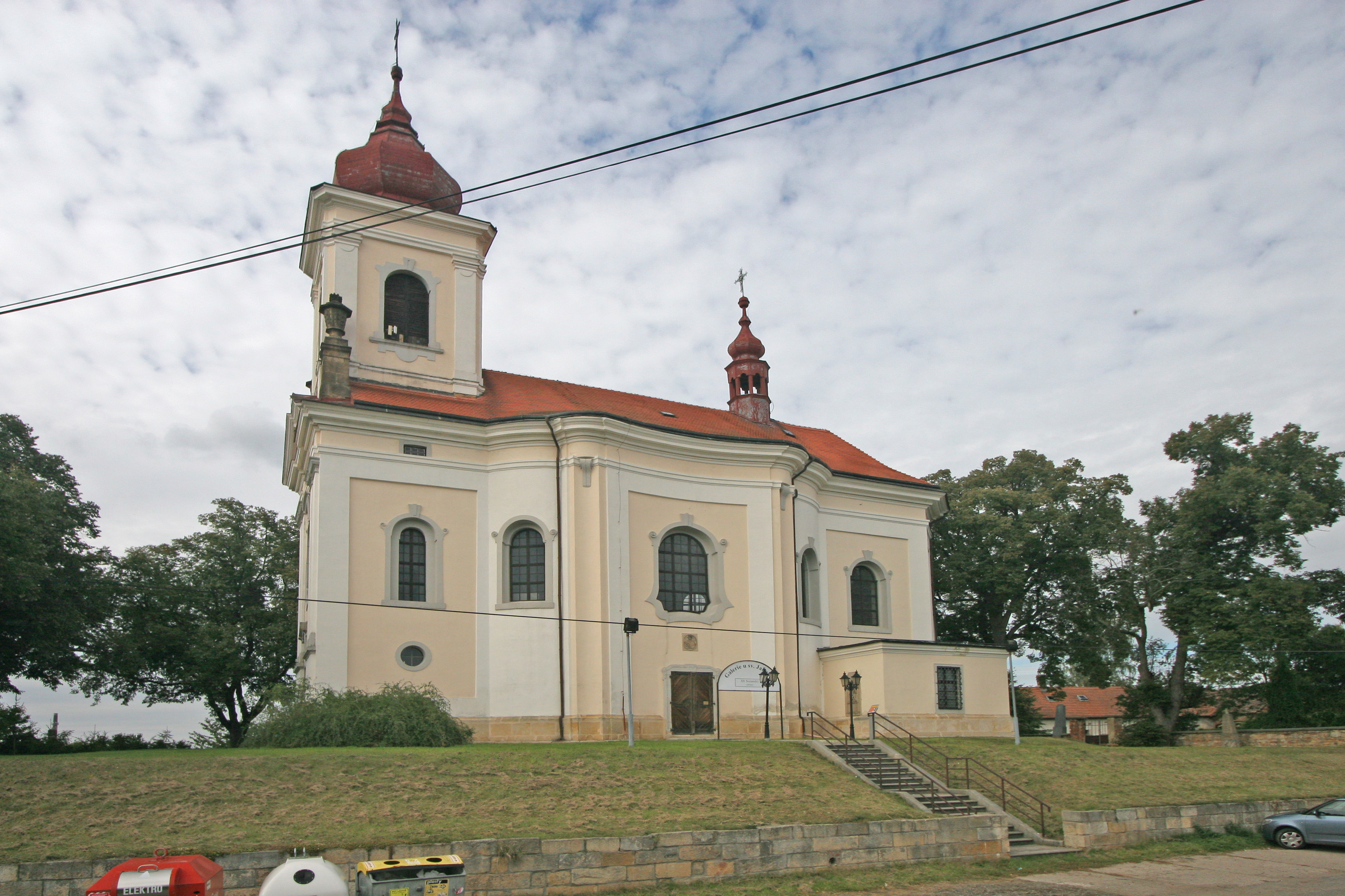 Kostel sv. Jakuba (Metličany), Metličany, Metličany